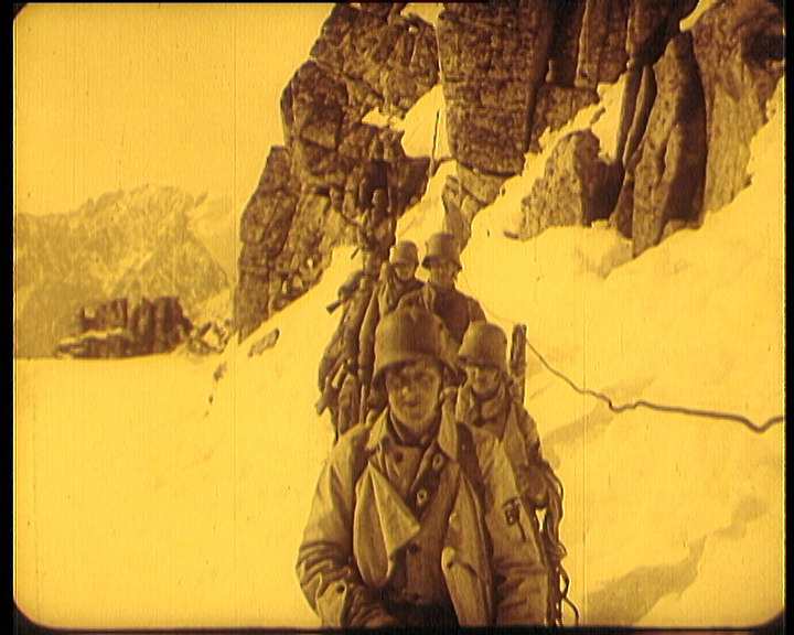 Szene aus dem Film Heldenkampf in Schnee und Eis